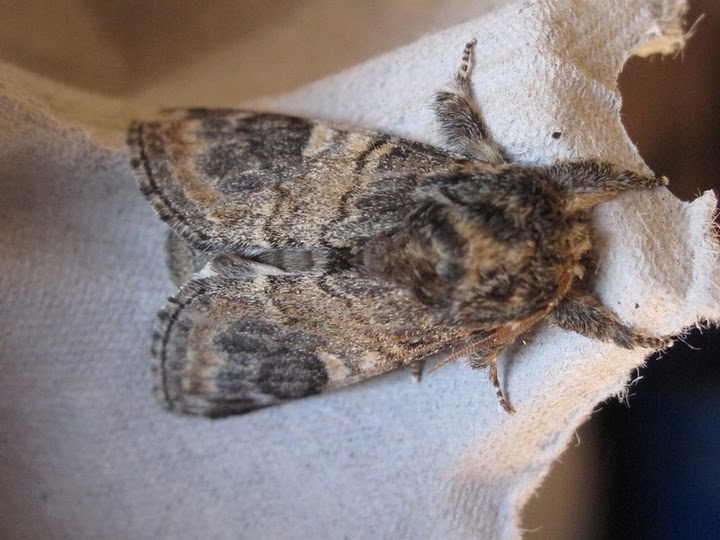 Wilgentandvlinder (Notodonta tritophus)